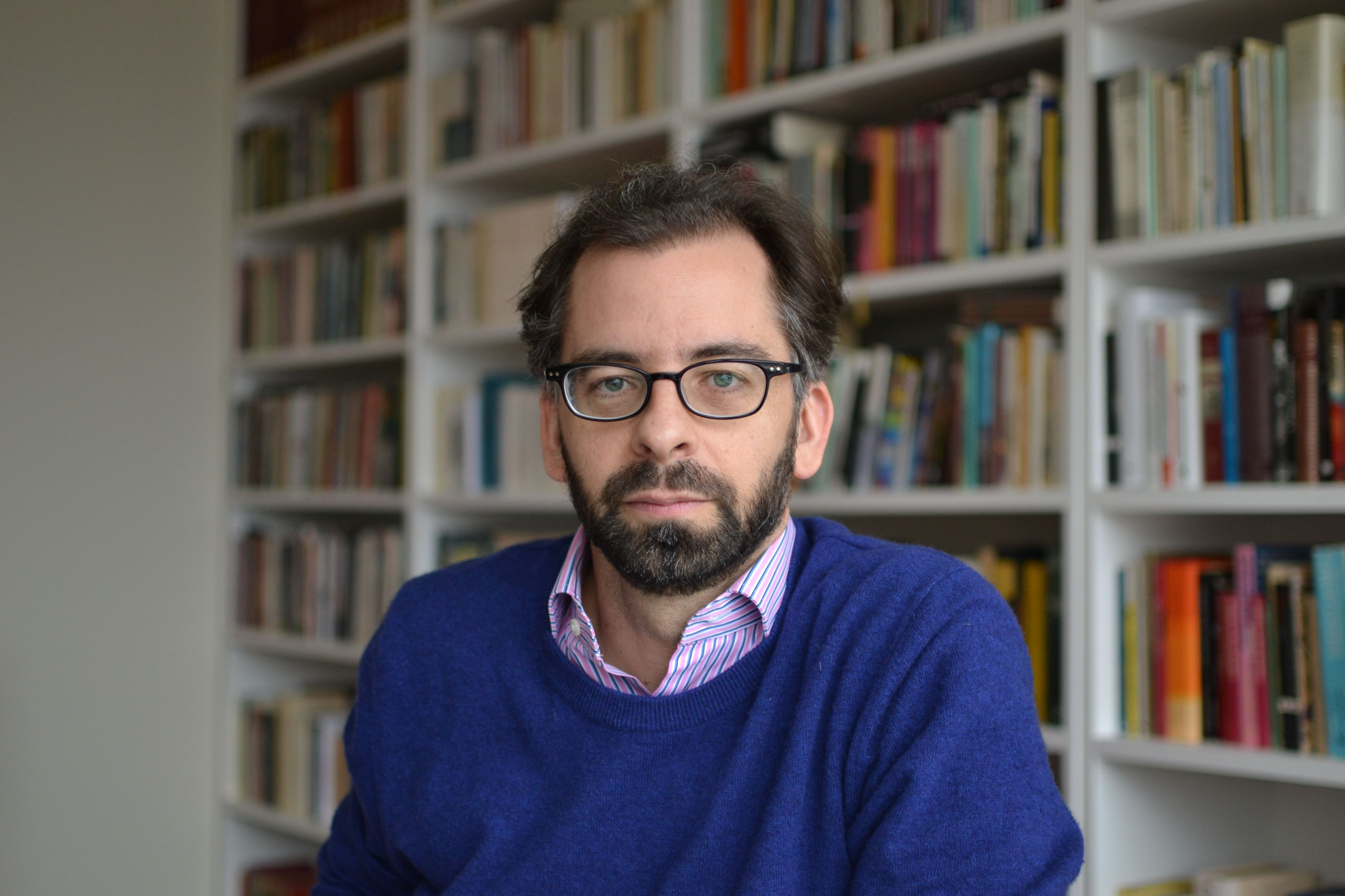 Mauricio Lyrio, fotografado em Nova York, em 2013.